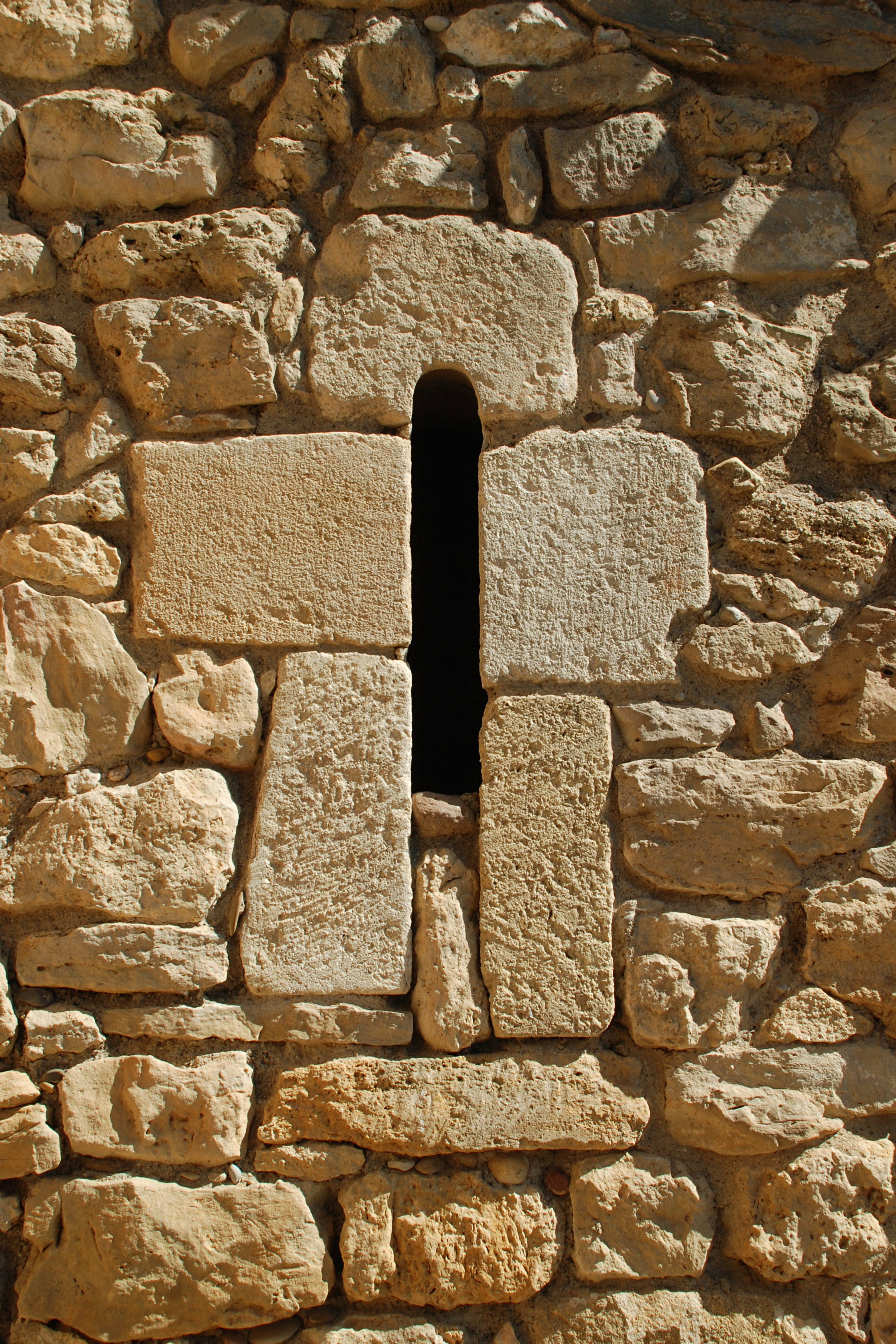 France - Languedoc - Aude - Moussan - chapelle Saint-Laurent (préroman) - baie de la face sud du chevet .